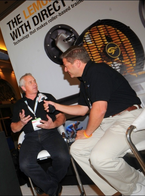 Cycling legend Greg LeMond being interviewed by David Bernstein for Interbike TV.